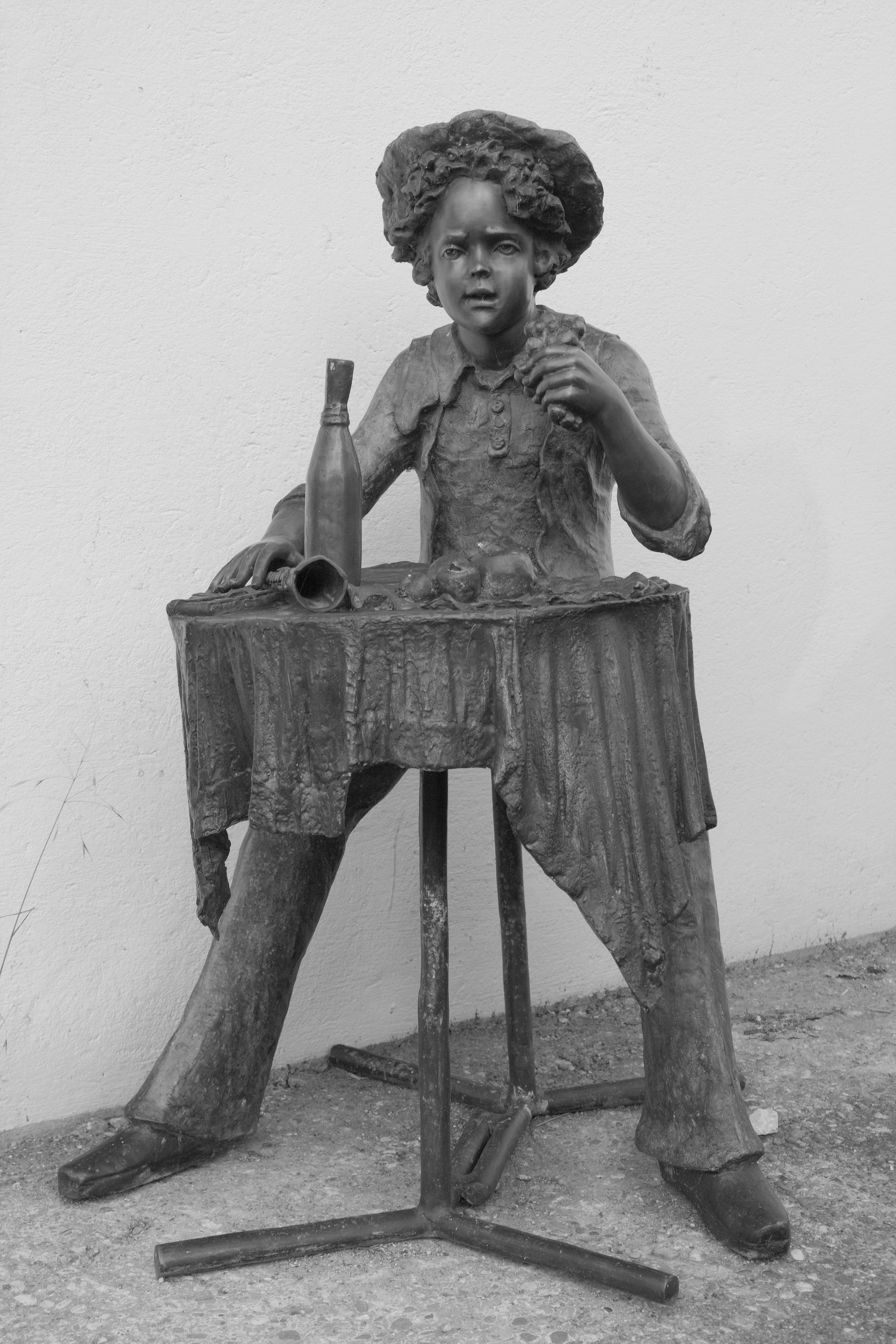 Bronzeskulptur in einem Garten in Bassecourt, Schweiz: Jüngling mit Mütze vor gedecktem Tisch, Trauben essend